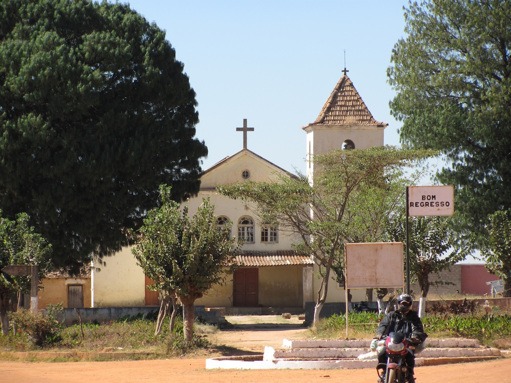 Church in Ecunha, Angola